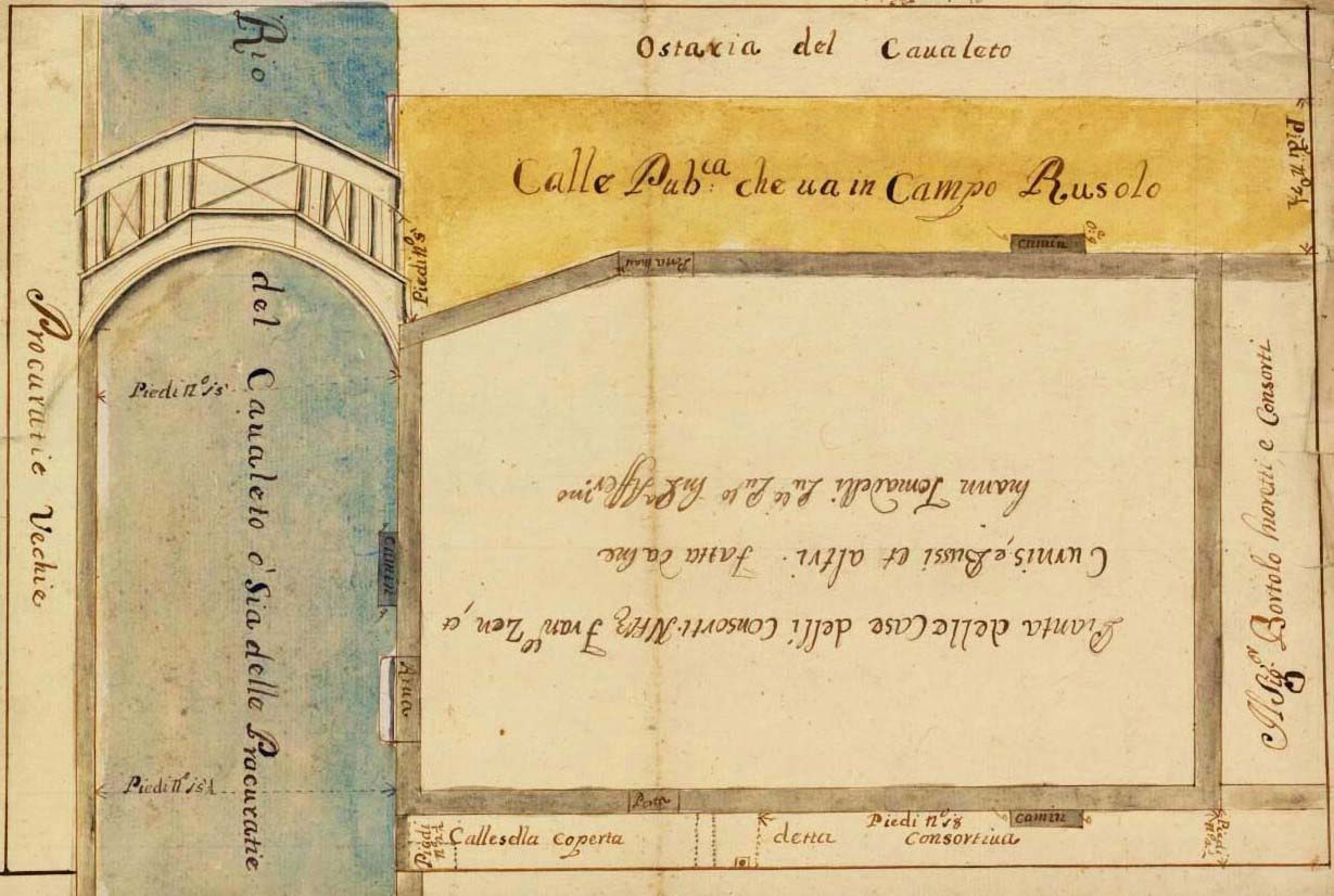 Міст через канал Каваллетто, що виводить до кампо Русоло (нині Сан-Галло).